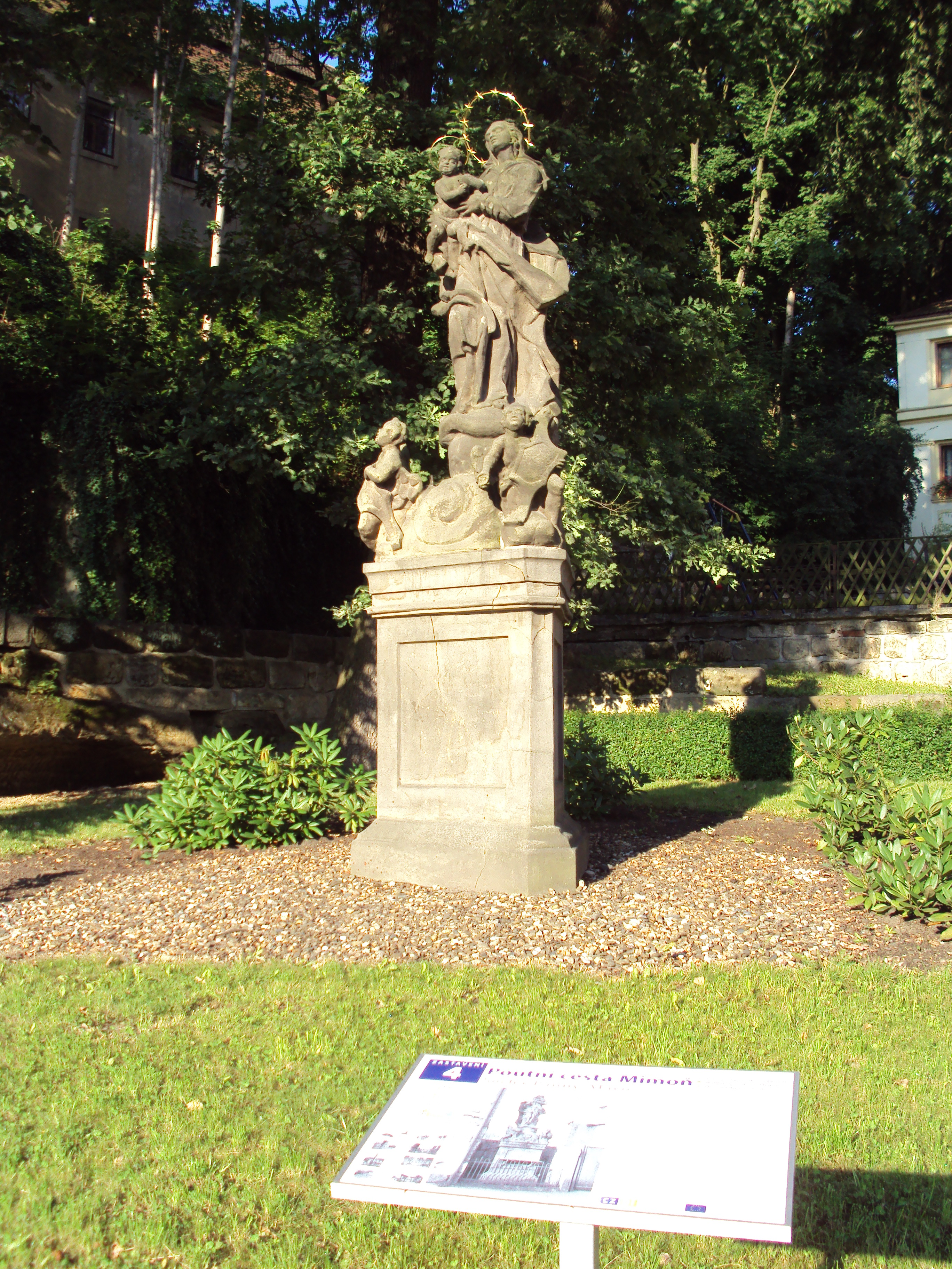 Sousoší Neposkvrněnného početí Panny Marie u hotelu Beseda (Nádražní 105), socha nyní v Mírové ulci